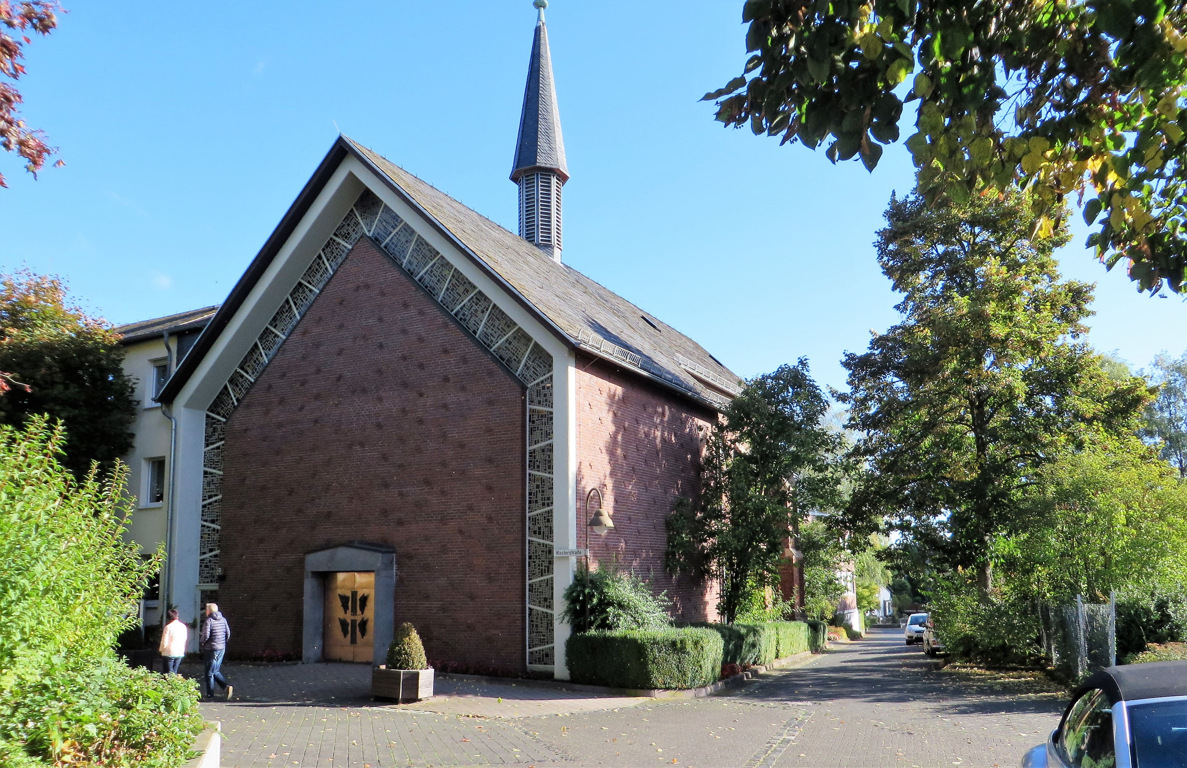 Klosterkirche von 1961 (Anbau) der Dernbacher Schwestern